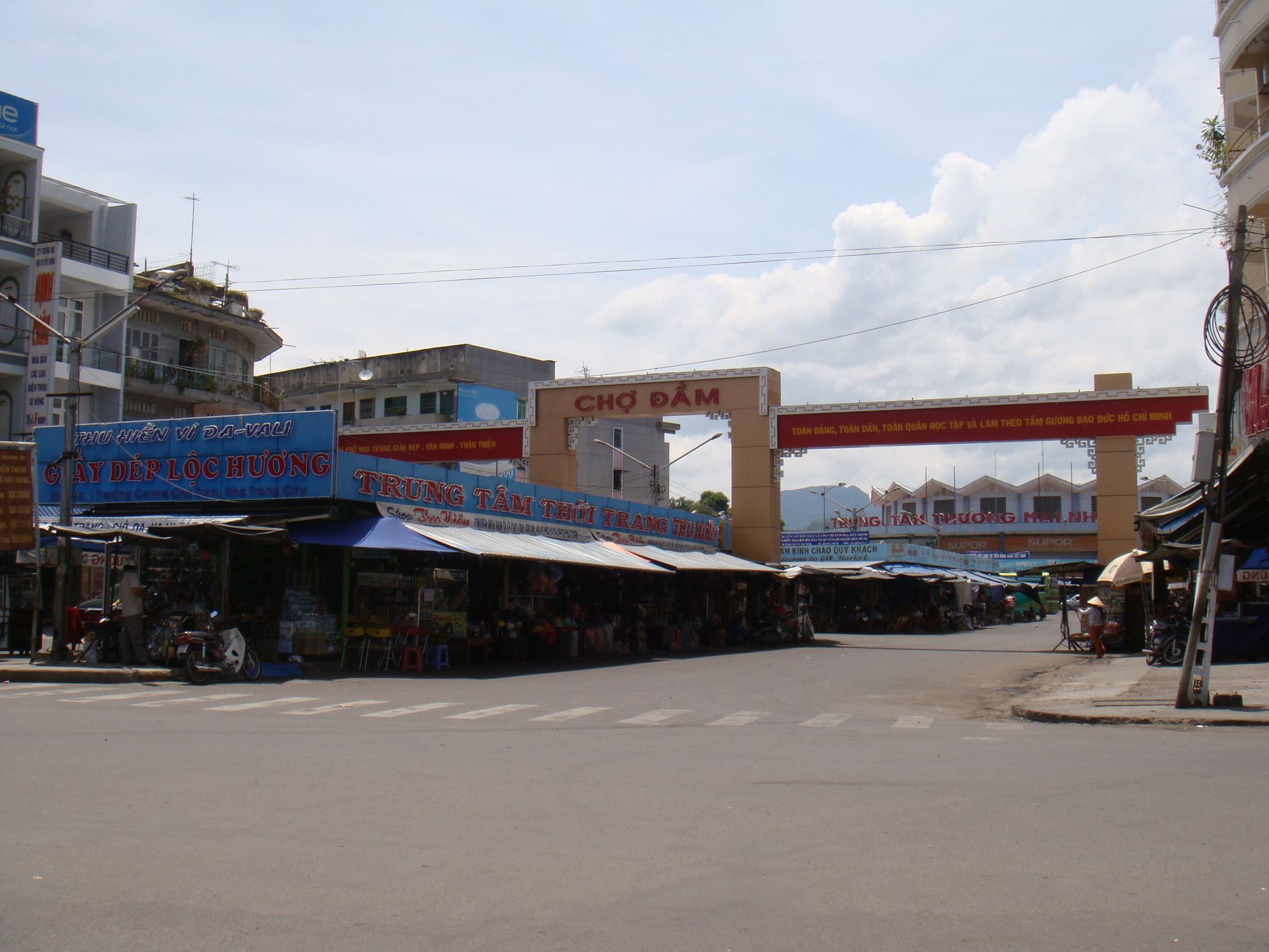 Nha Trang Chợ Đầm market